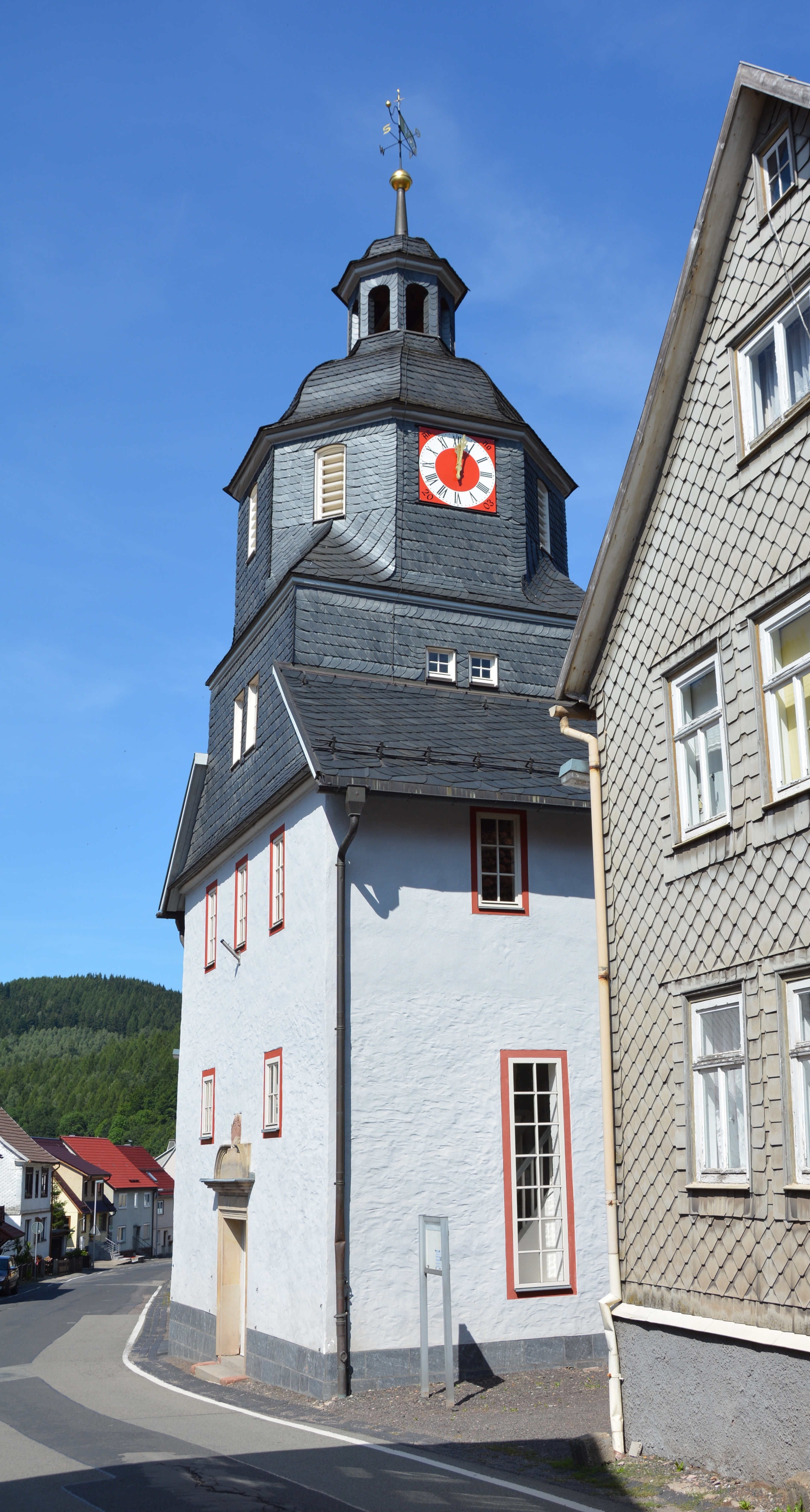 Ev.-Luth. Kirche Oberschönau